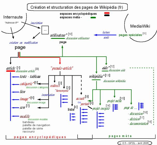 Schéma de création et structuration des différents types de page - Wikipédia francophone Version 0.5 (2e version) Présenté au Bistro, fin mars 2005